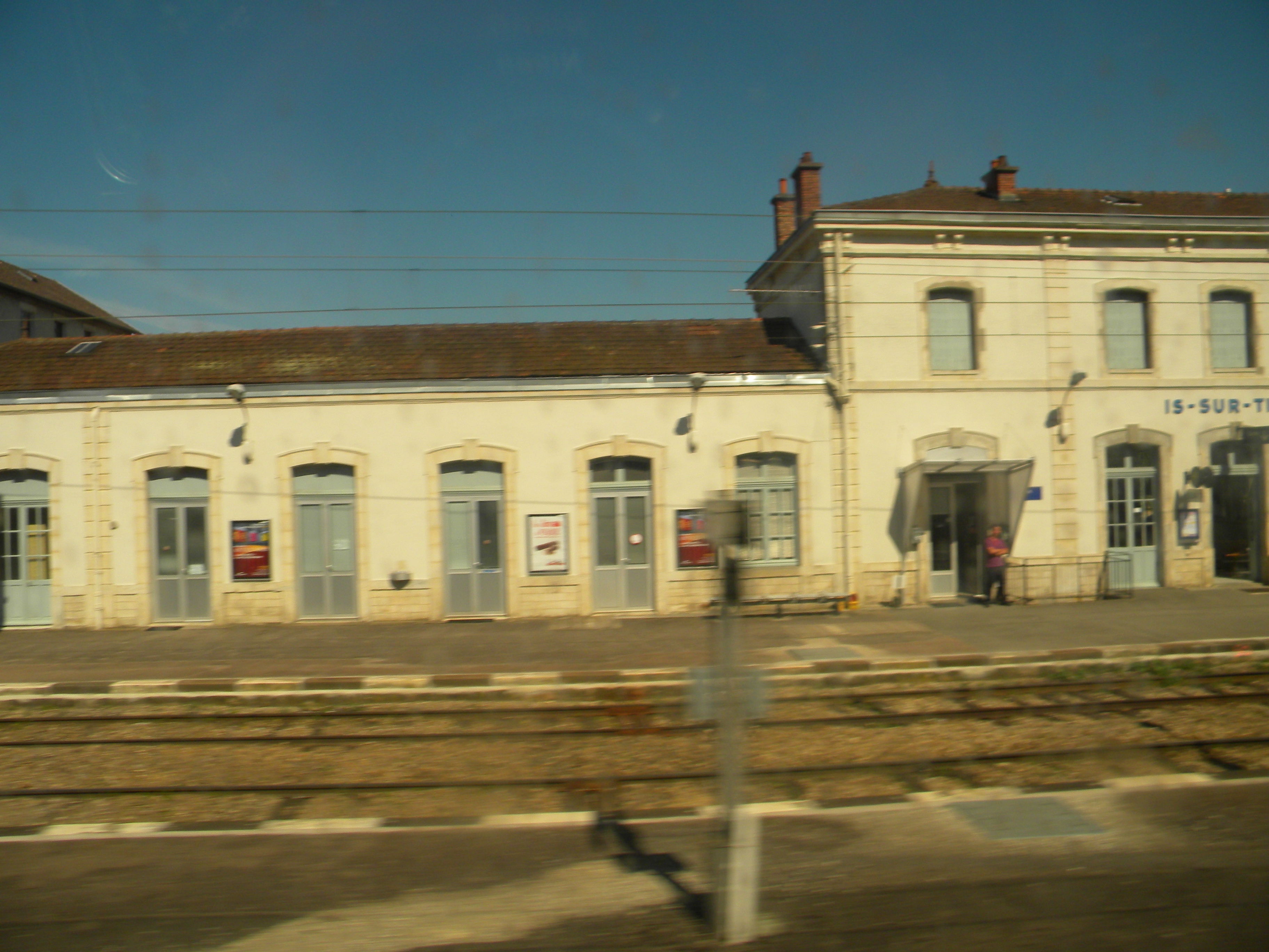 Gare d'Is-sur-Tille